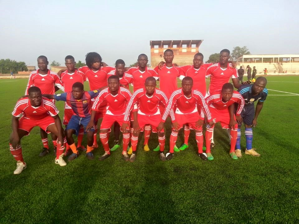 Stade municipal de djougou 2